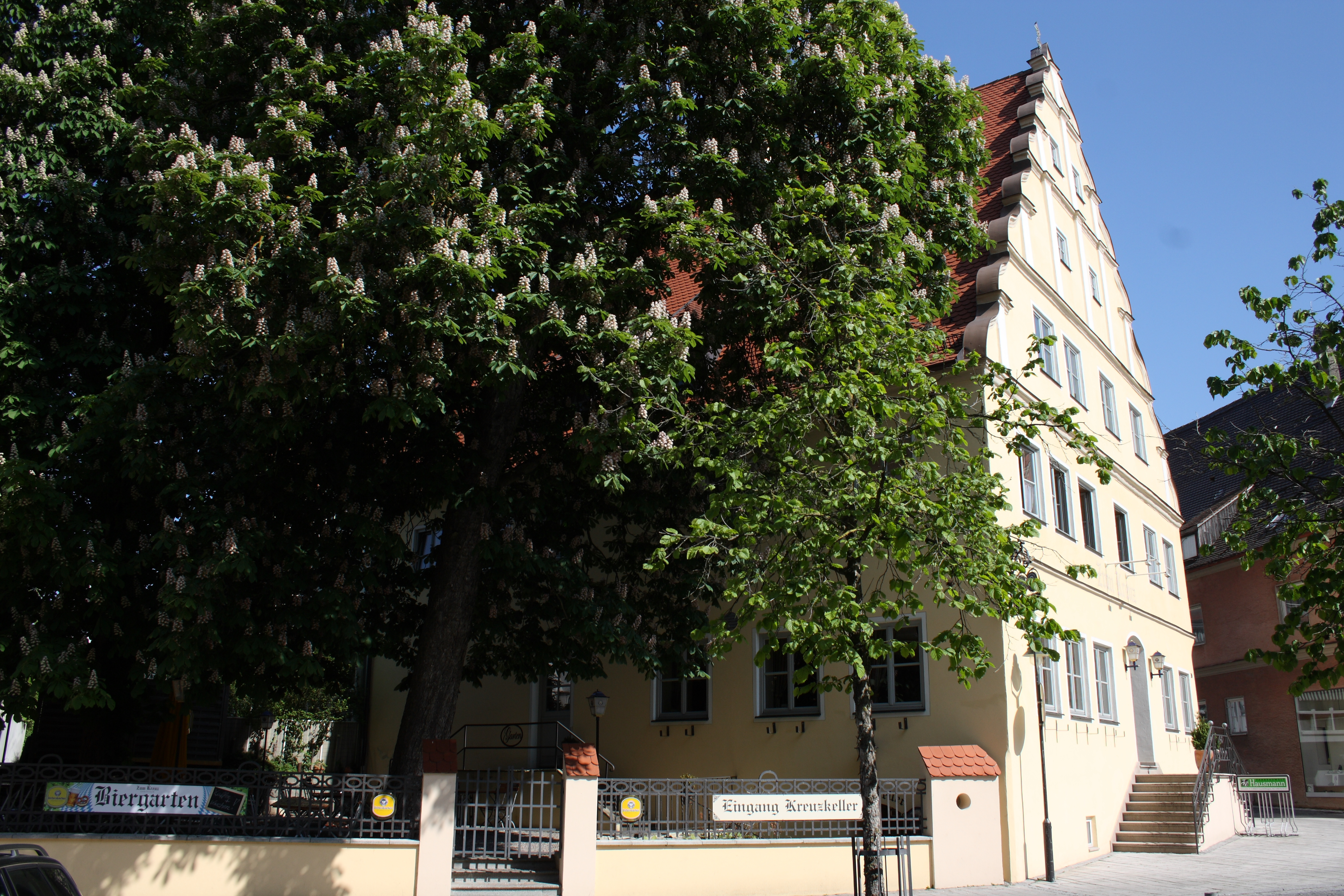 Haus Hauptstraße 30 in Gundelfingen an der Donau, Gasthaus zum Kreuz